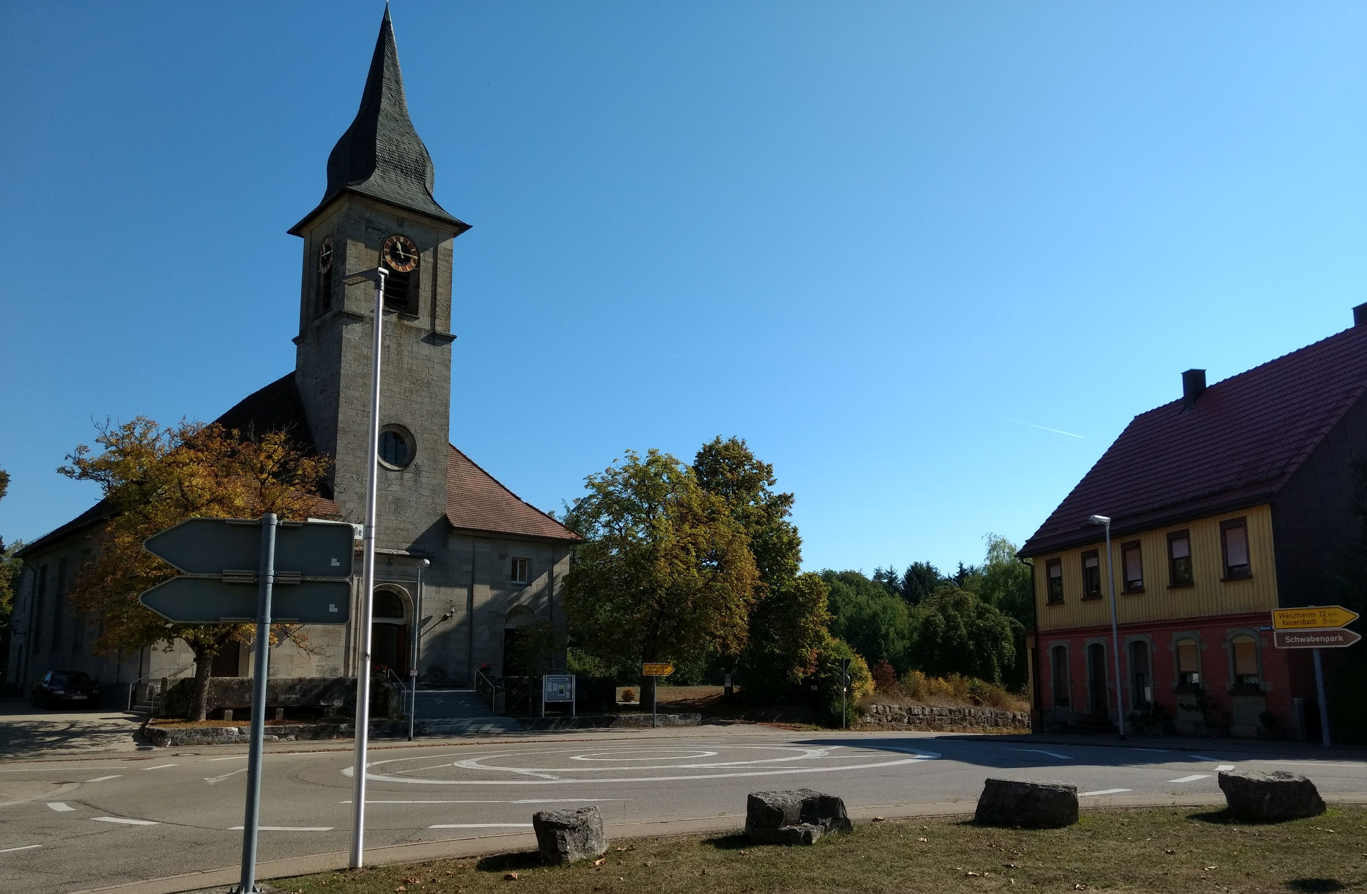 Kirche Kirchenkirnberg